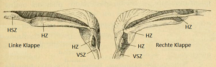 Cardita calyculata (Linnaeus, 1758), Carditidae, Bivalvia, Mollusca, Schlosszähne, Beschriftung auf deutsch